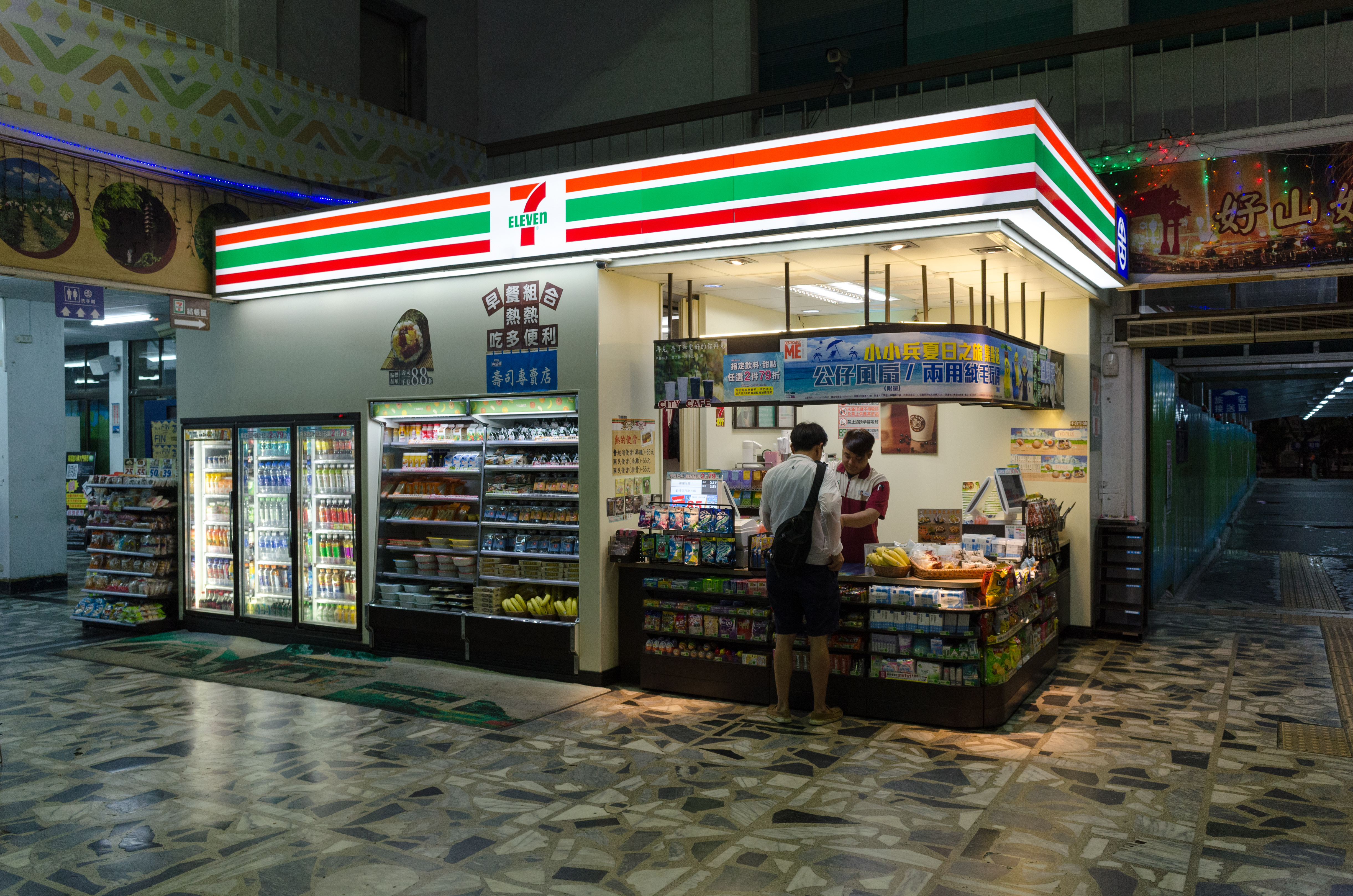 雨夜戶外行人絕跡，花蓮車站內的7-Eleven花蓮站門市（153364）依然燈火通明，迎接歸鄉的遊子。